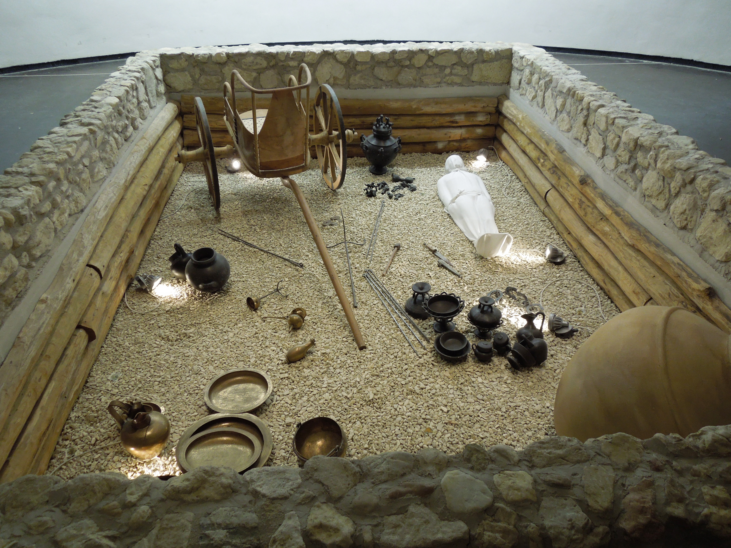 Ricostruzione di una camera sepolcrale della Necropoli di Campovalano. Un sentito ringraziamento al Funzionario Maria Di Gennaro della Soprintendenza A.B.A.P d'Abruzzo.